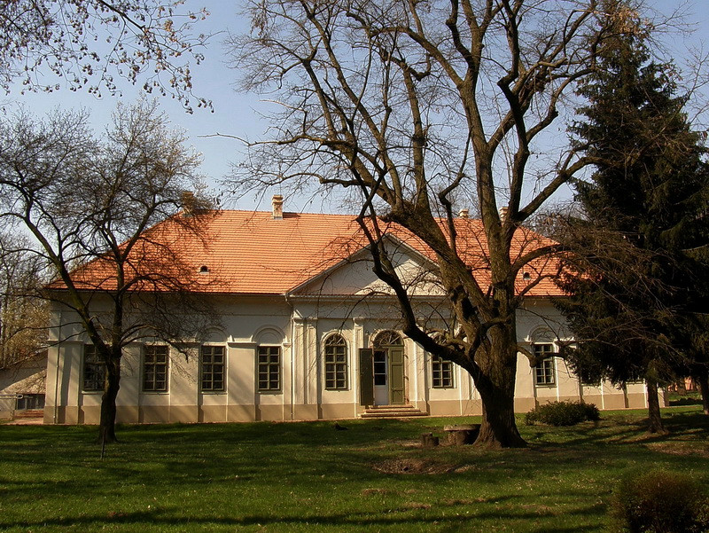 Gindly-Benyovszky-kúria (szociális otthon) klasszicista azonosító 8772 (törzsszám 4219). 1860-ban Gindly Rudolf, később a Benyovszky család tulajdonában.- (Tengelic, Alsótengelic) This is a photo of a monument in Hungary, Identifier: 8772